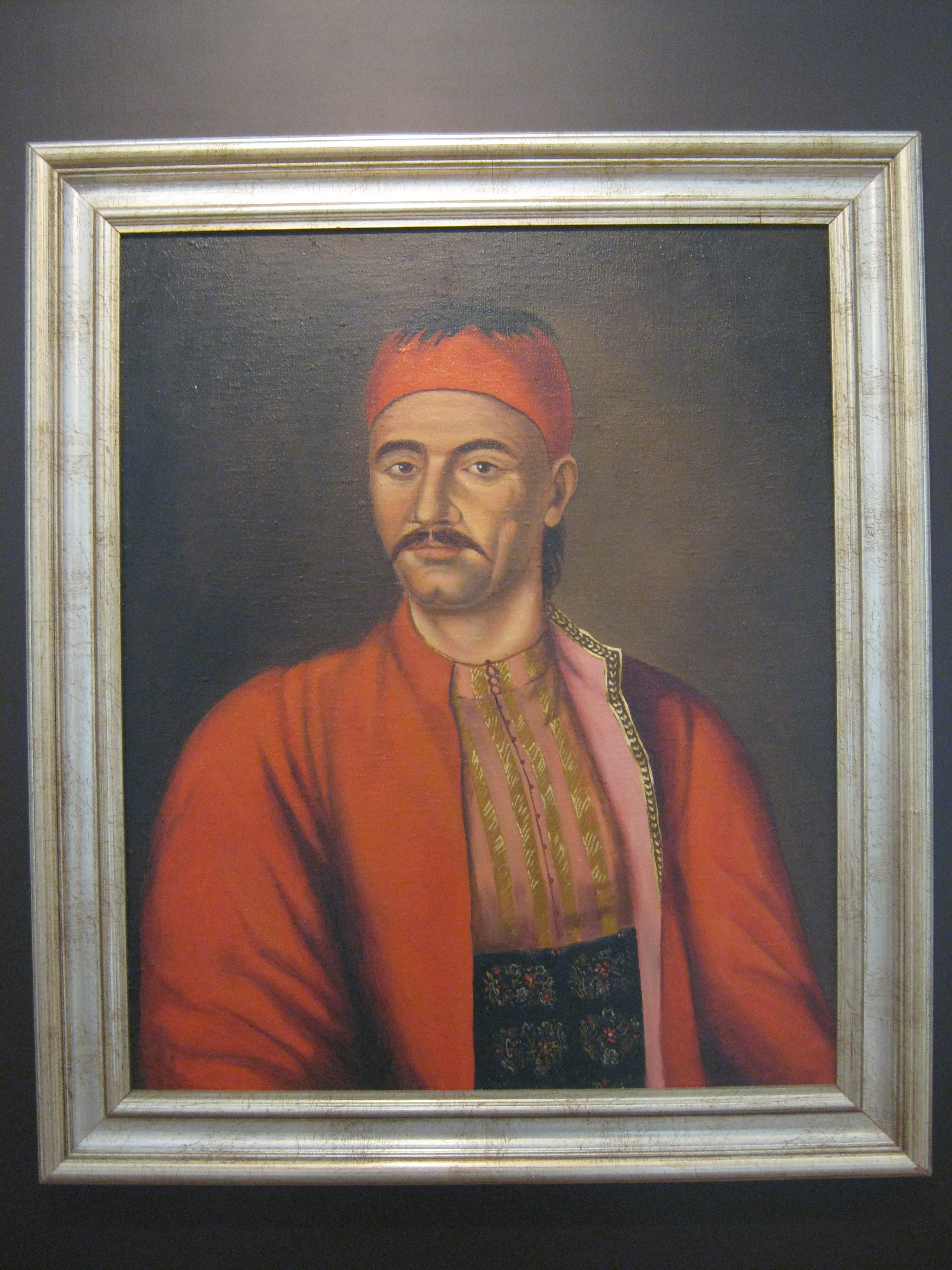 Музеј Другог српског устанка се налази у Такову и послује као део Музеја Рудничко-таковског краја. Музеј је смештен у згради старе таковске школе. У згради је смештена изложба предмета и докумената из Другог српског устанка.